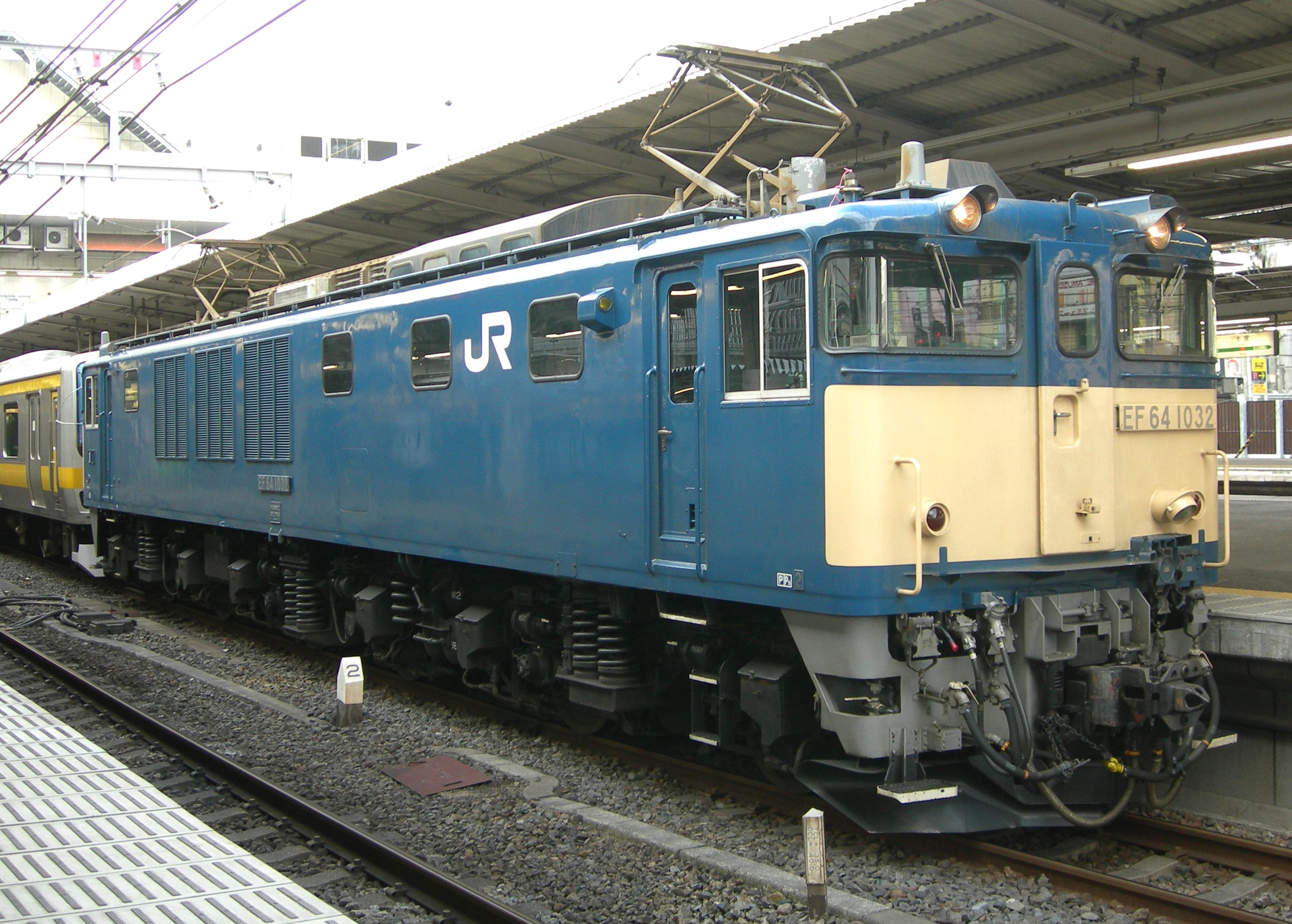 EF64型電気機関車 大宮駅で撮影